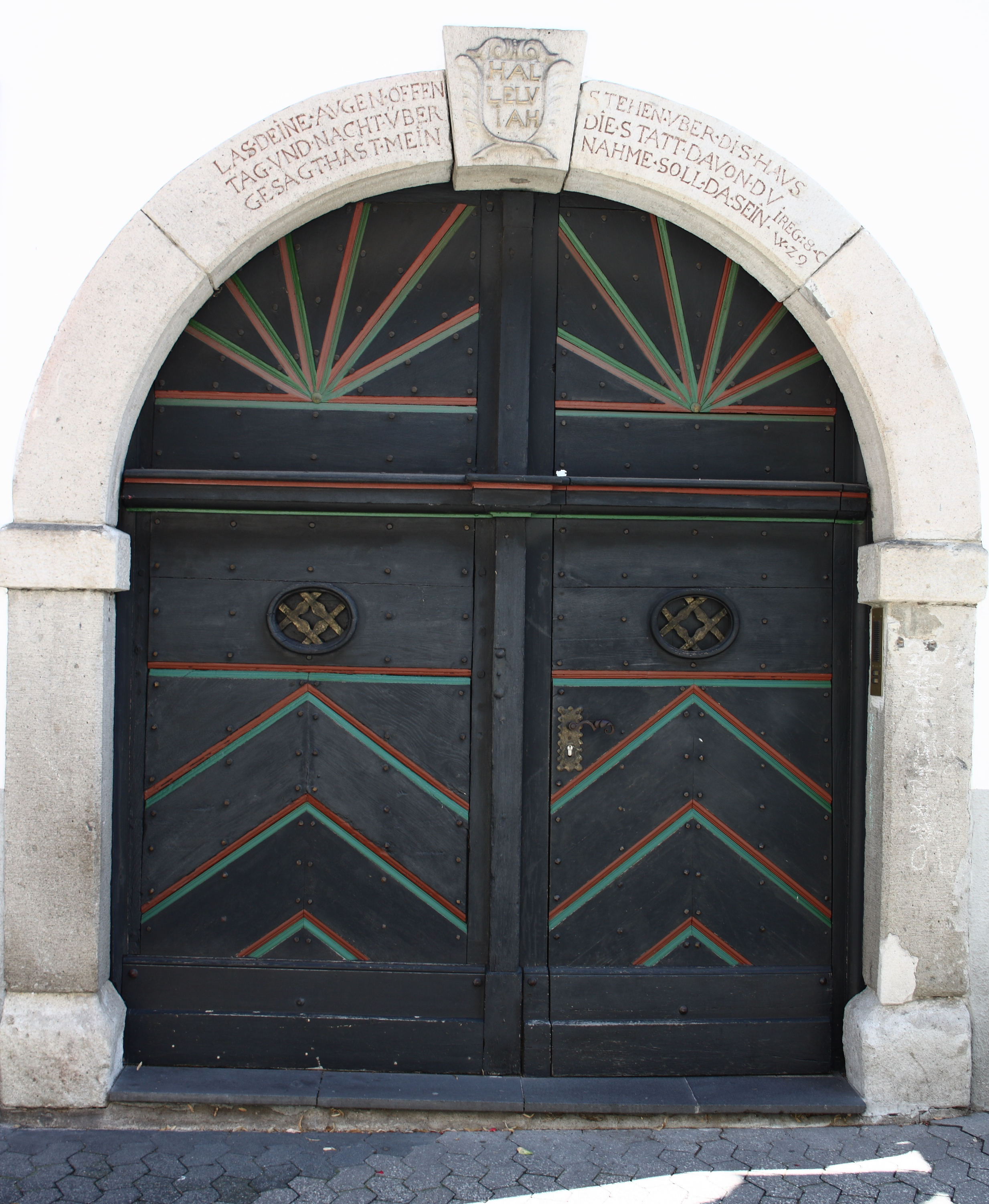 ehemaliges evangelisches Pfarrhaus in Oberwinter, Hauptstraße 82, bezeichnet 1715